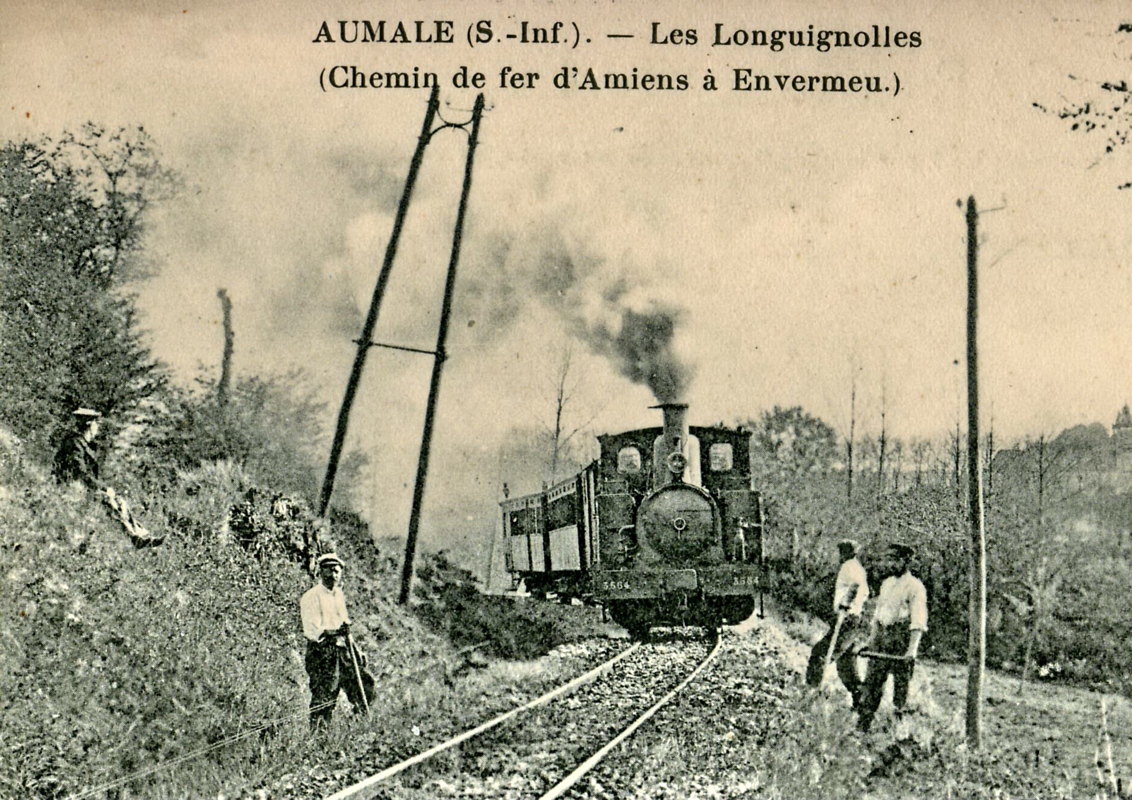 détail d'une carte postale ancienne éditée par ArnouldAumale (Seine-Maritime) : Locomotive 3564 (ou 3664) de la Compagnie des chemins de fer économiques tractant un train à voie métrique au lieu dit Les Longuignoles sur la ligne de chemin de fer secondaire Amiens - Envermeu